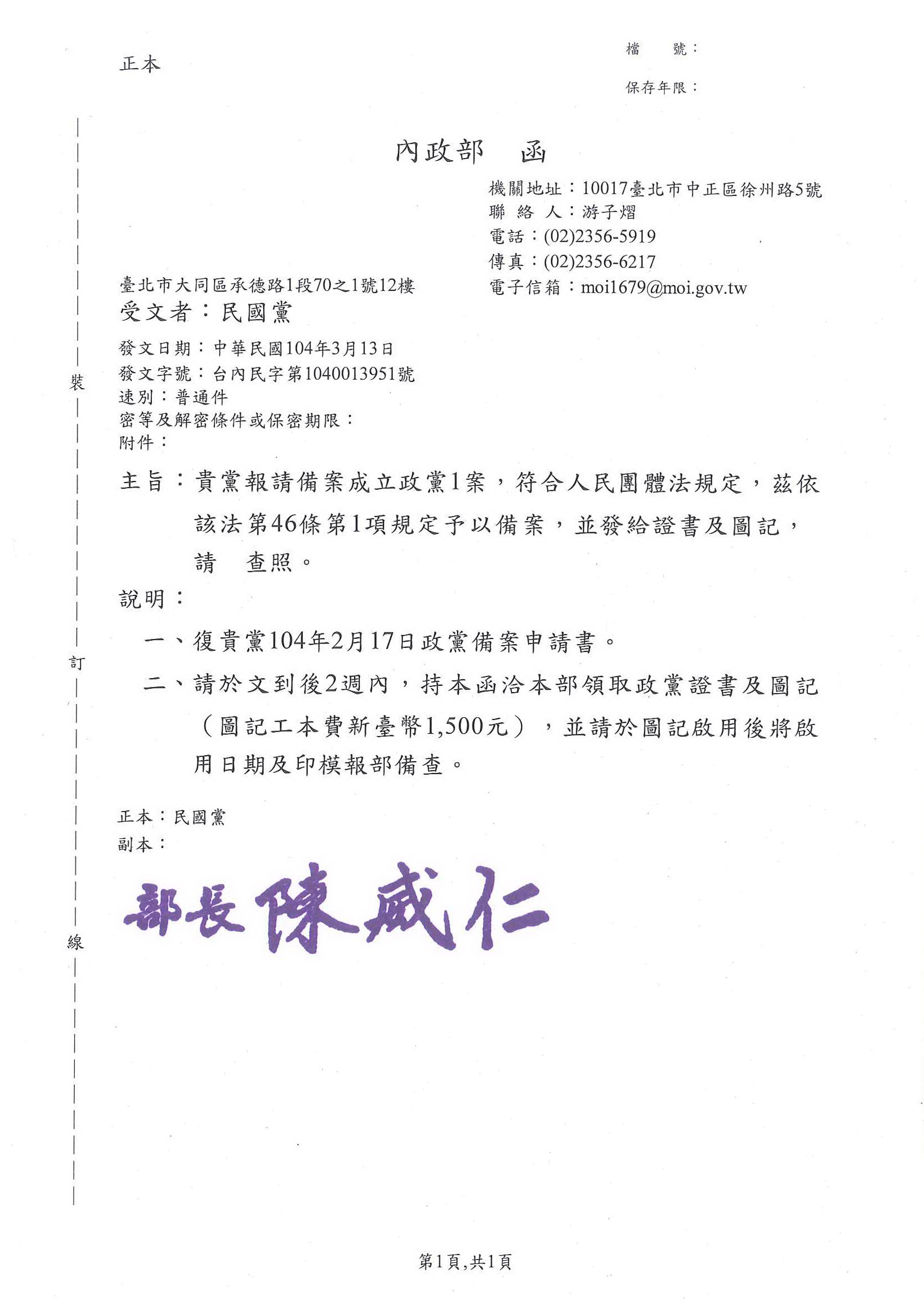 中華民國內政部台內民字第1040013951號函正本，核准民國黨備案。